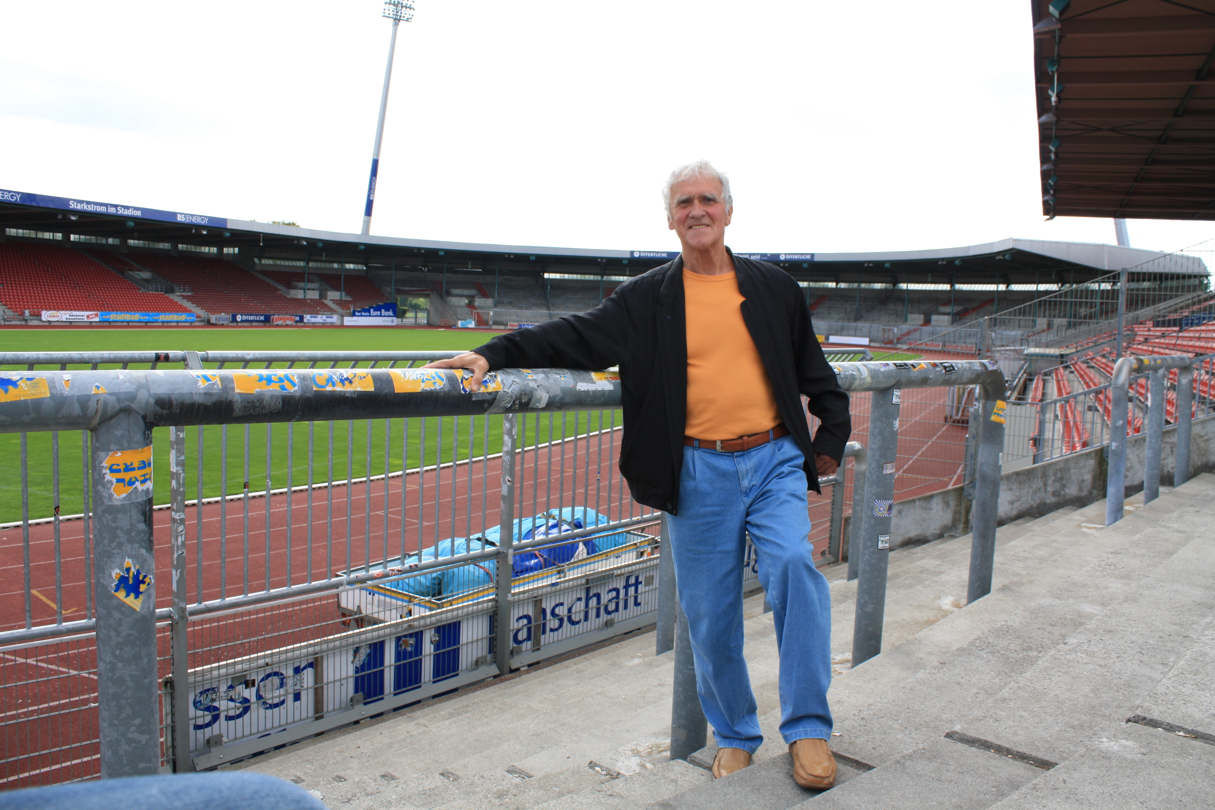 Walter Schmidt, Deutscher Meister von 1967 mit Eintracht Braunschweig, zurück an alter Wirkungsstätte.